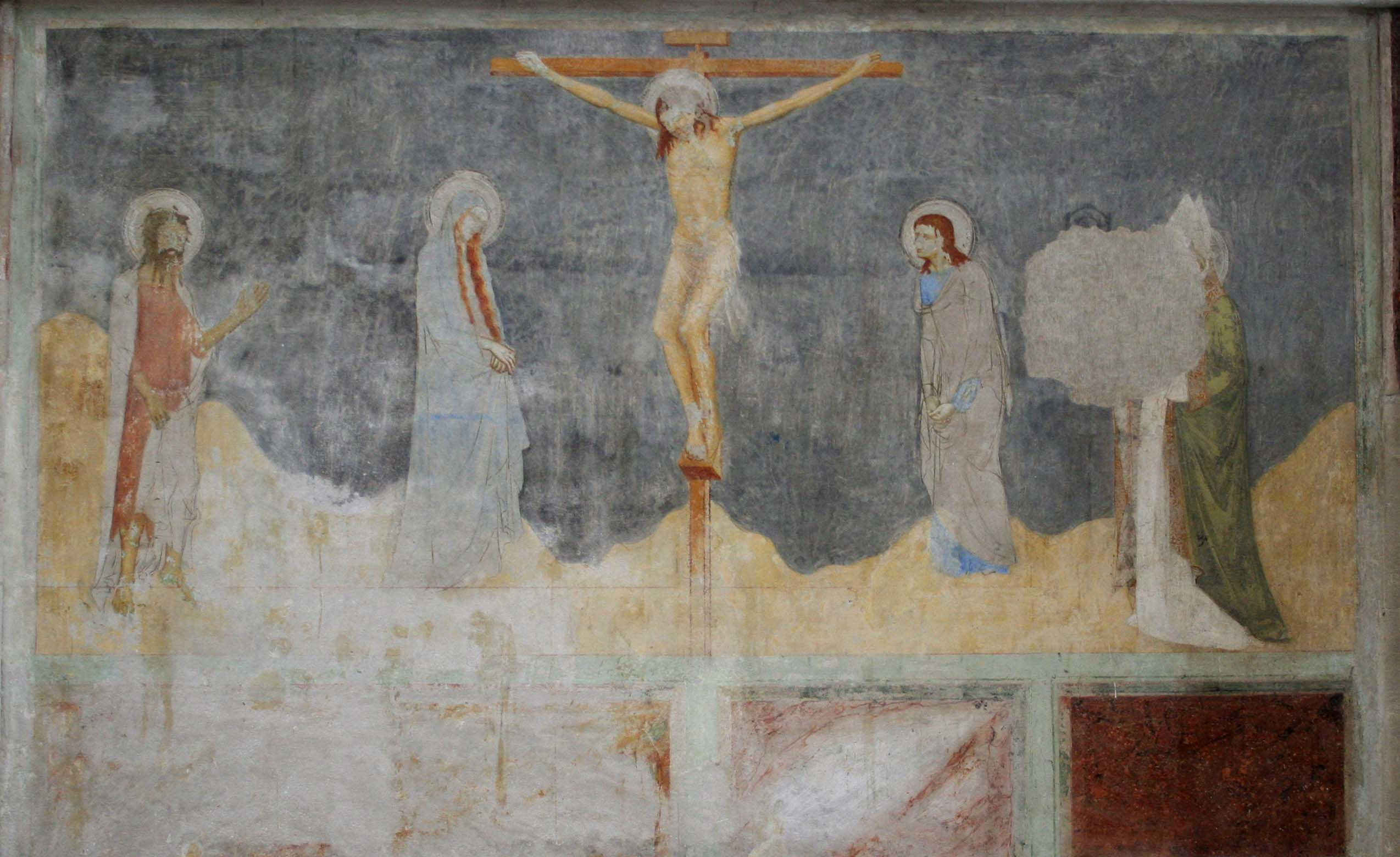 Fresque de Matteo Giovannetti peintes vers 1355 dans la chapelle des fresques de la chartreuse de Villeneuve-lès-Avignon représentant la crucifixion.